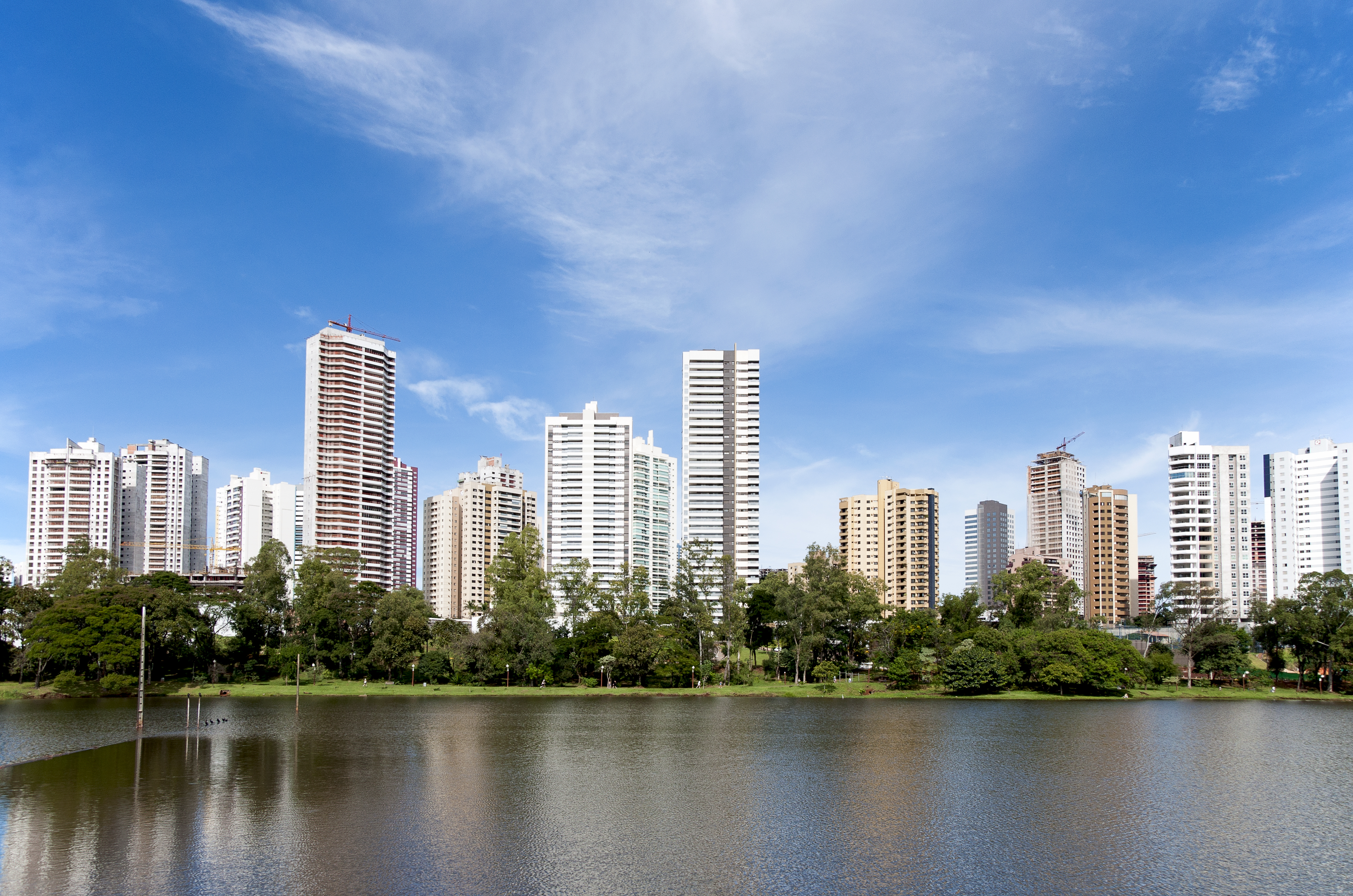 Lago Igapó, Londrina